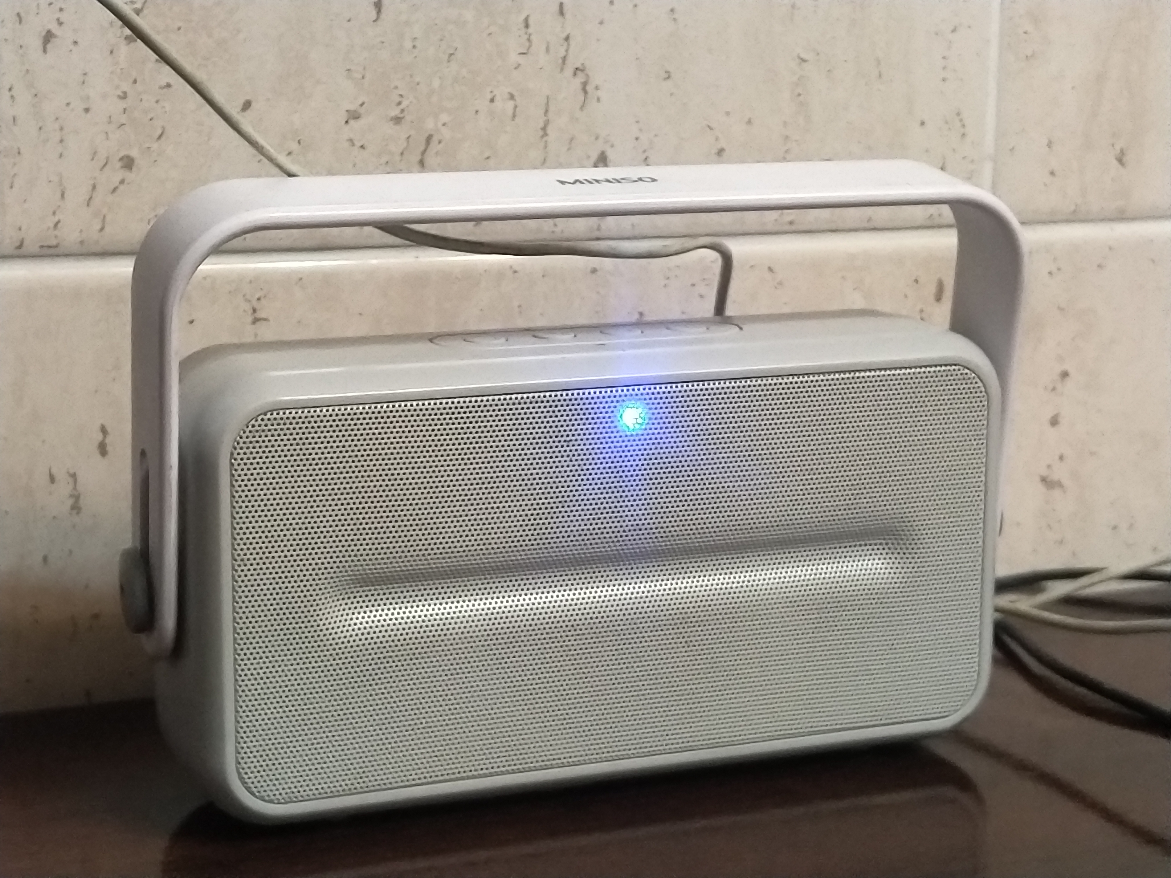 Miniso 藍芽音響 北歐設計師款手提型 DS-2066